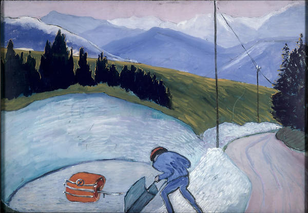 Die Steingrube, Gemälde, der russischen Künstlerin Marianne von Werefkin 1907